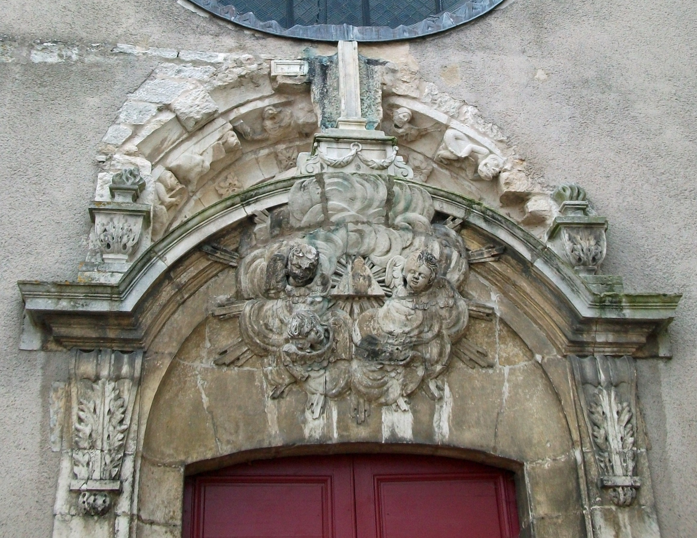 vue de l'Église st-Pierre (Liverdun).